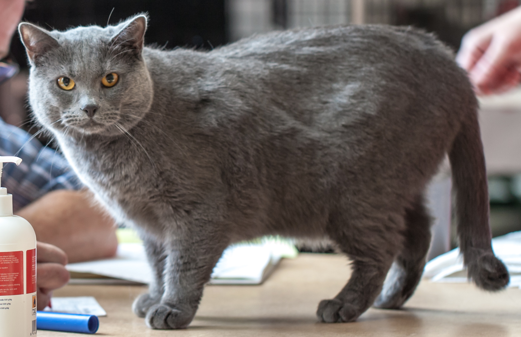 Keijuhovin Boromir Ponteva (Porri) [CHA] male EX1 CAGPIB Mâle chartreux présenté en exposition féline au SUROK cat show Helsinki 2013.